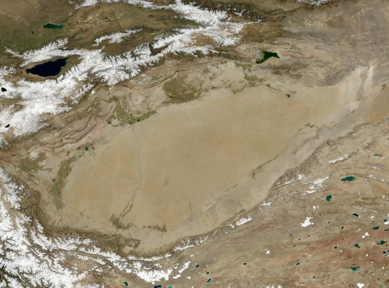 Tarim Basin, Asia